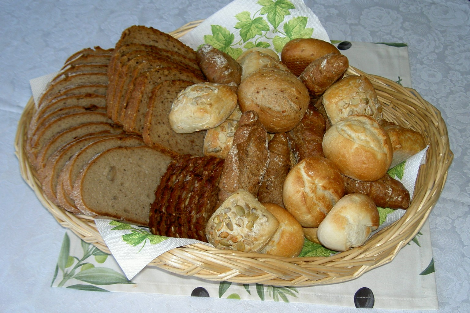 Eine Zusammenstellung verschiedener Brotsorten. Dieser kommt beispielsweise bei kalten Buffets zum Einsatz.